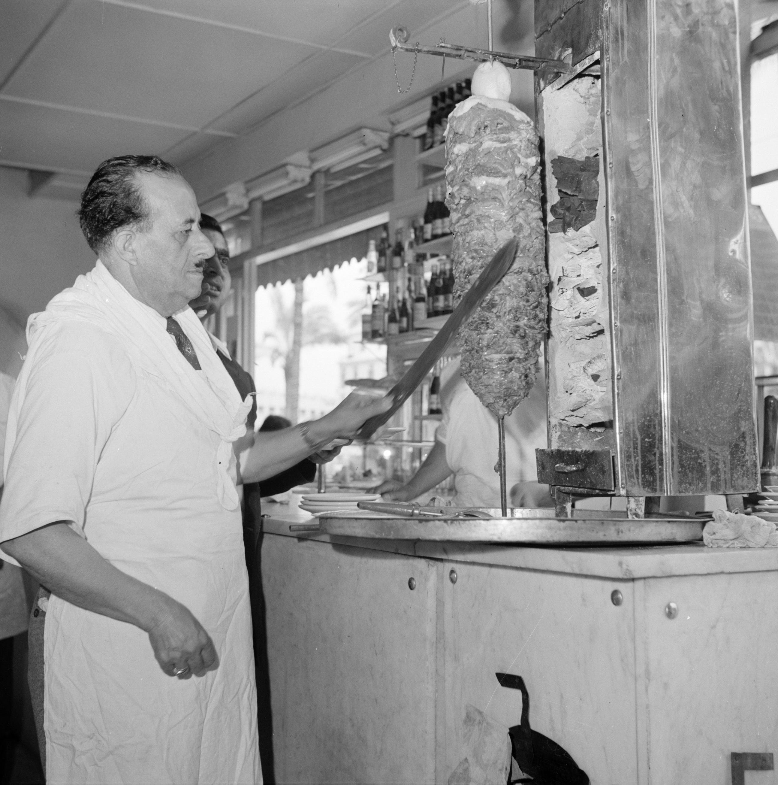 Collectie / Archief : Fotocollectie Van de Poll Reportage / Serie : Midden-Oosten 1950-1955: Libanon Beschrijving : Restauranthouder bij zijn shoarma spit Datum : 1950 Locatie : Beiroet, Libanon Trefwoorden : restaurants, vlees Fotograaf : Poll, Willem van de Auteursrechthebbende : Nationaal Archief Materiaalsoort : Negatief (zwart/wit) Nummer archiefinventaris : bekijk toegang 2.24.14.02 Bestanddeelnummer : 255-6509